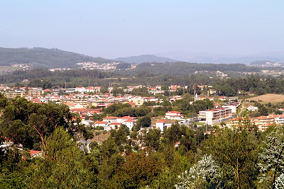 vista linde de esmeriz